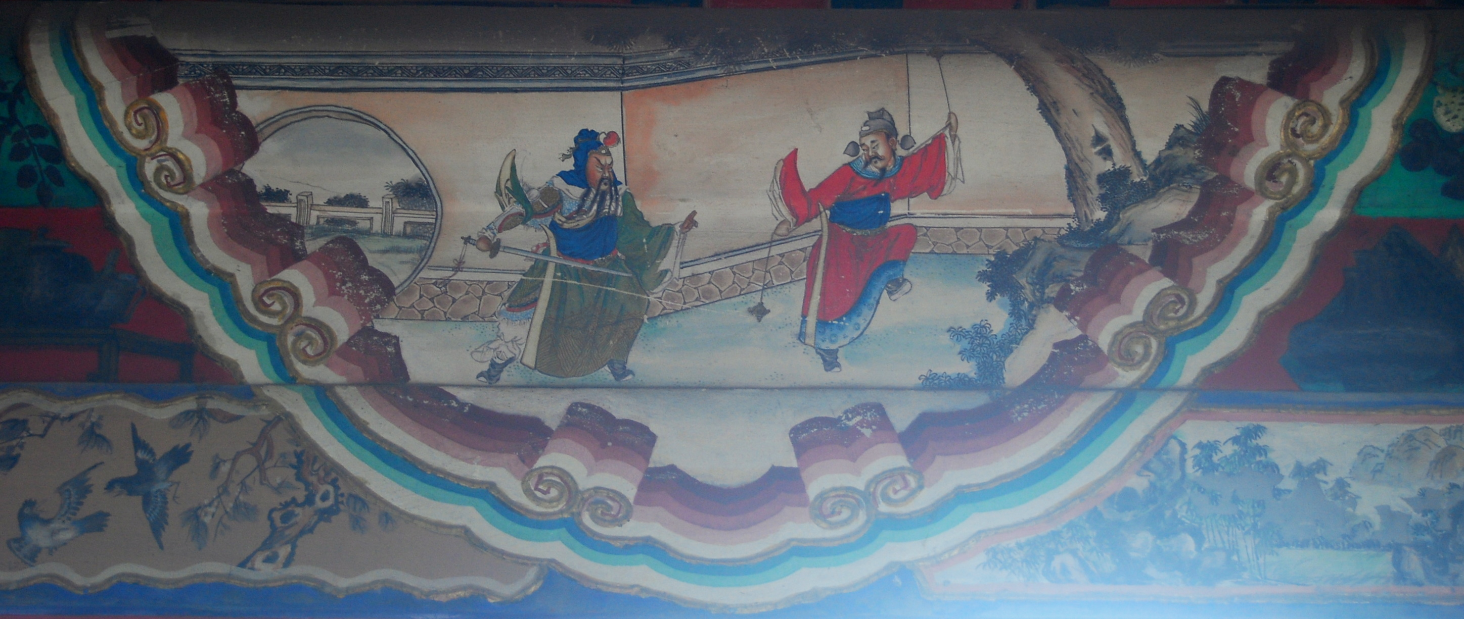 Quan Công chém Biện Hỷ - Di Hòa Viên